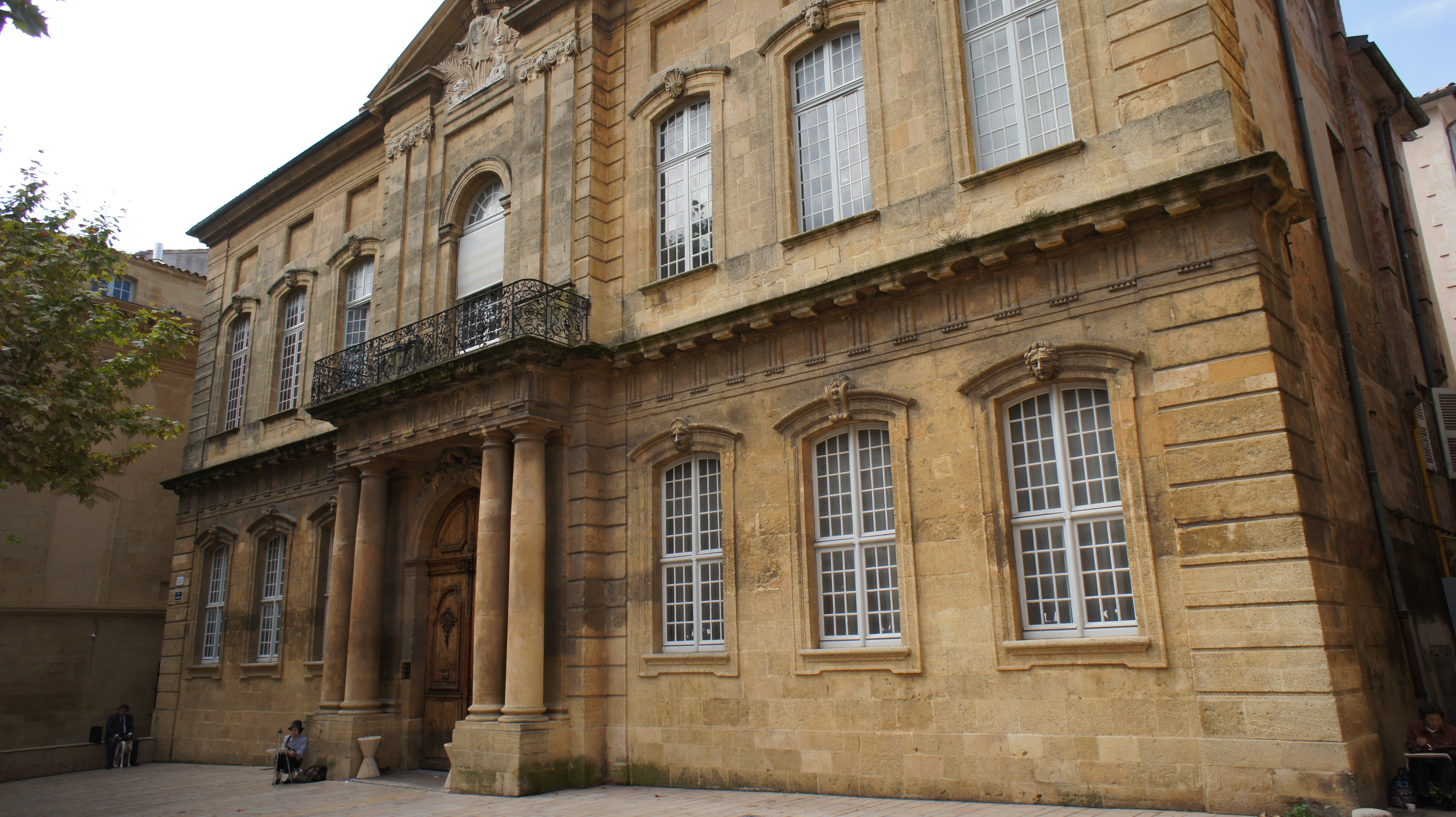 Faculté de droit d'Aix-en-Provence .